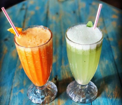 Los frescos son las bebidas por excelencia en Costa Rica; en la imagen uno de melón en leche (izquierda) y otro de limón con hierbabuena.